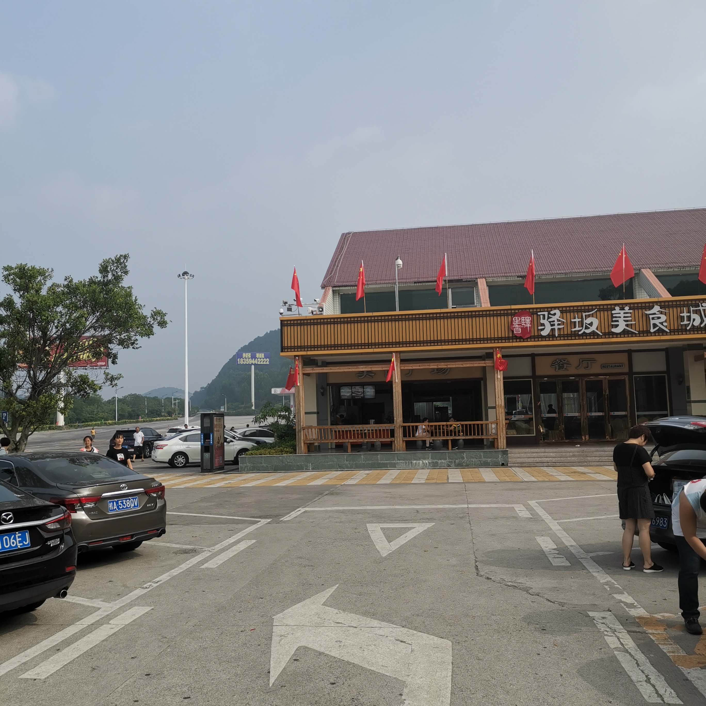 中文（中国大陆）: 福泉高速公路福泉段驿坂服务区